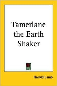 তৈমুরলং দ্যা আর্থ শেকার হ্যারল্ড ল্যামের ইতিহাস আশ্রিত উপন্যাস। এটি বইটির প্রচ্ছদ।